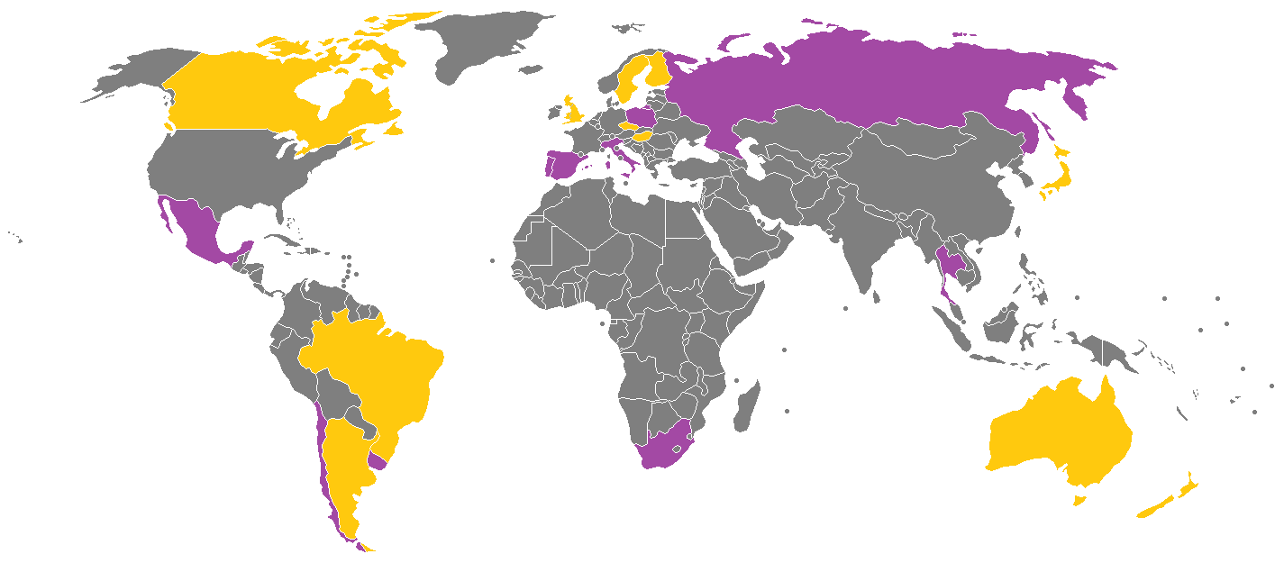 Cette carte indique le statut du don du sang homosexuel dans le monde. autorisé mais avec délai d'attente autorisé sans restriction particulière